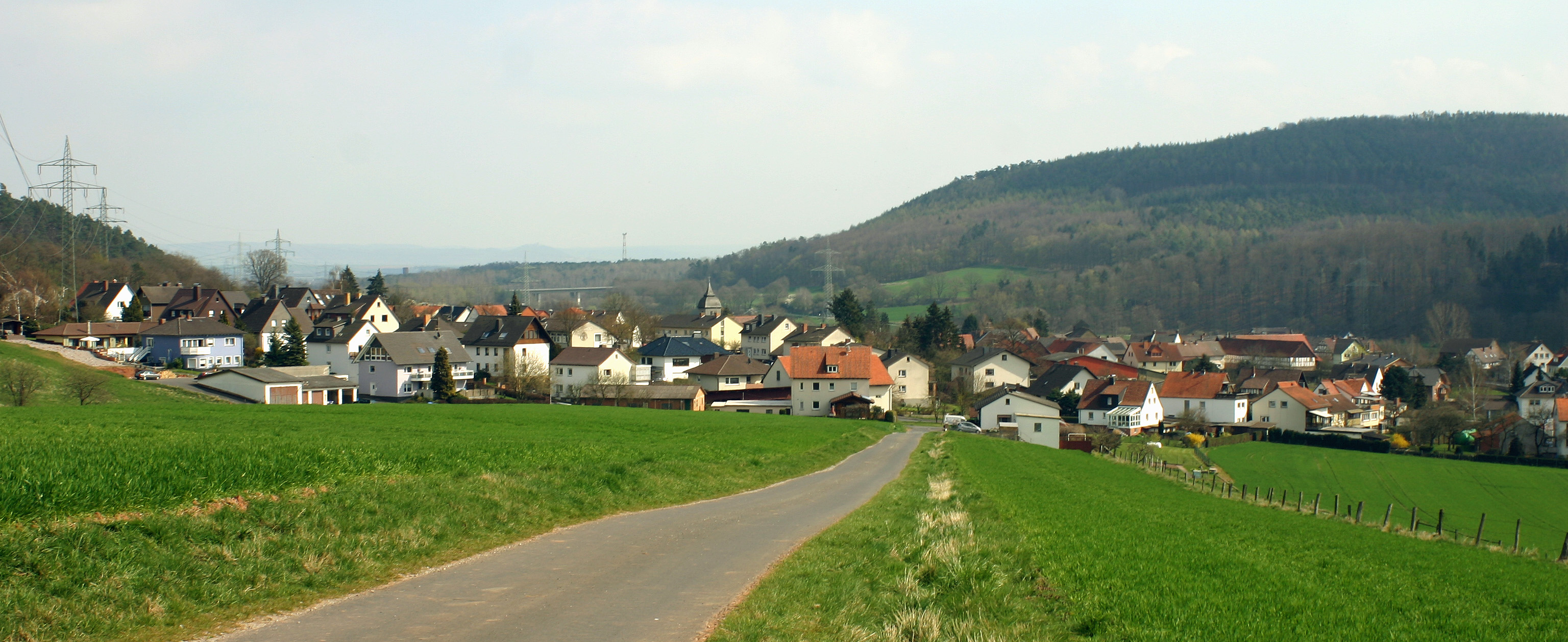 Panaoramablick auf Kerstenhausen und die Schwalmpforte von Westen; rechts der Kuhberg